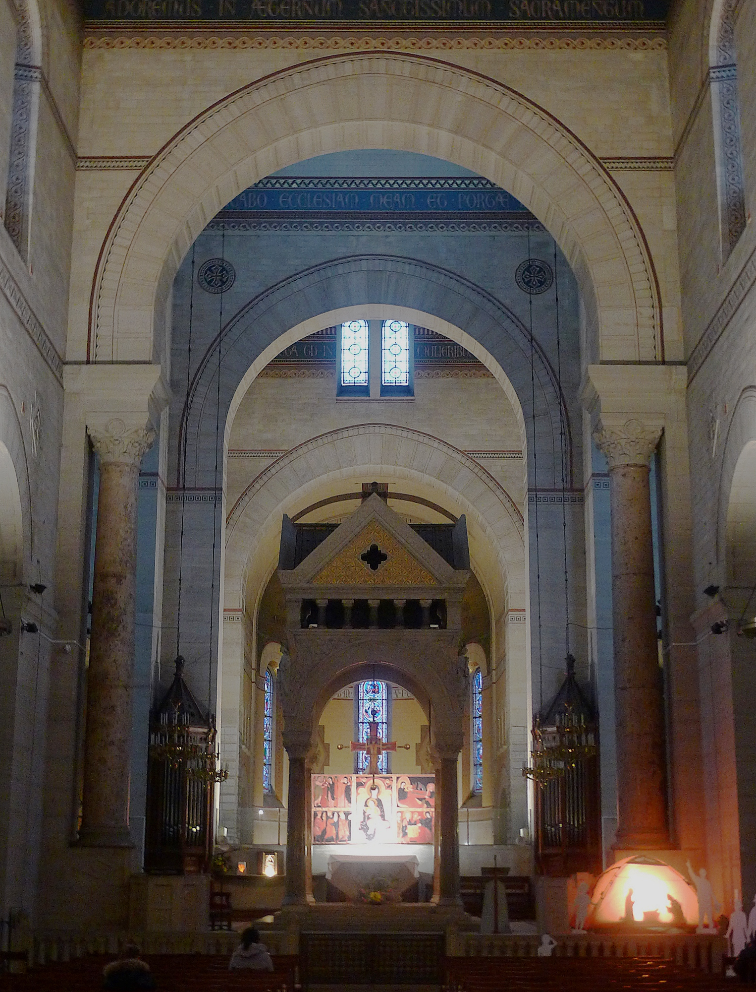 Église Saint-Pierre-de-Montrouge (choeur) - Paris XIV .